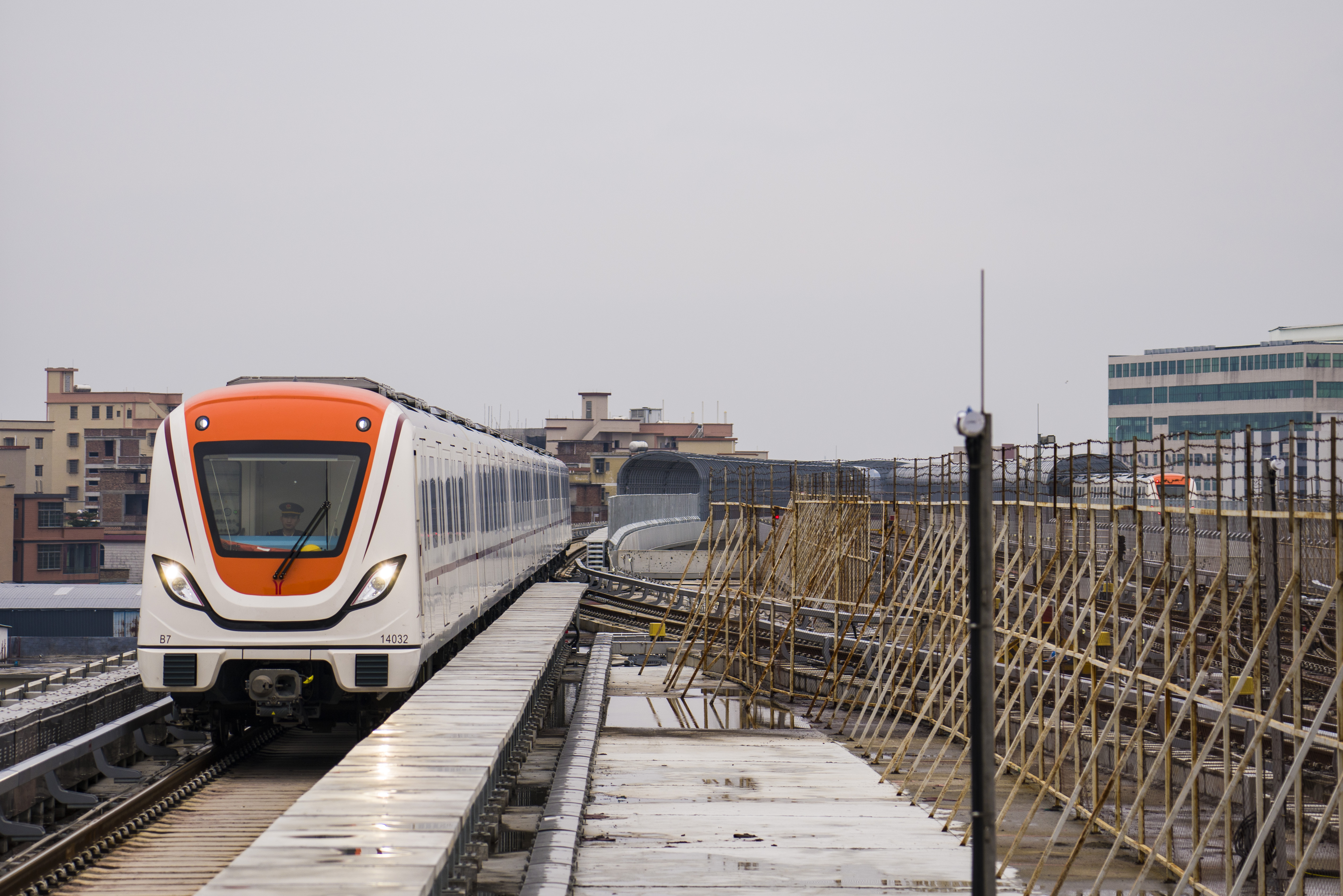 一列14号线列车驶入新和站，与此同时远处的另一列列车正往嘉禾望岗方向驶出。